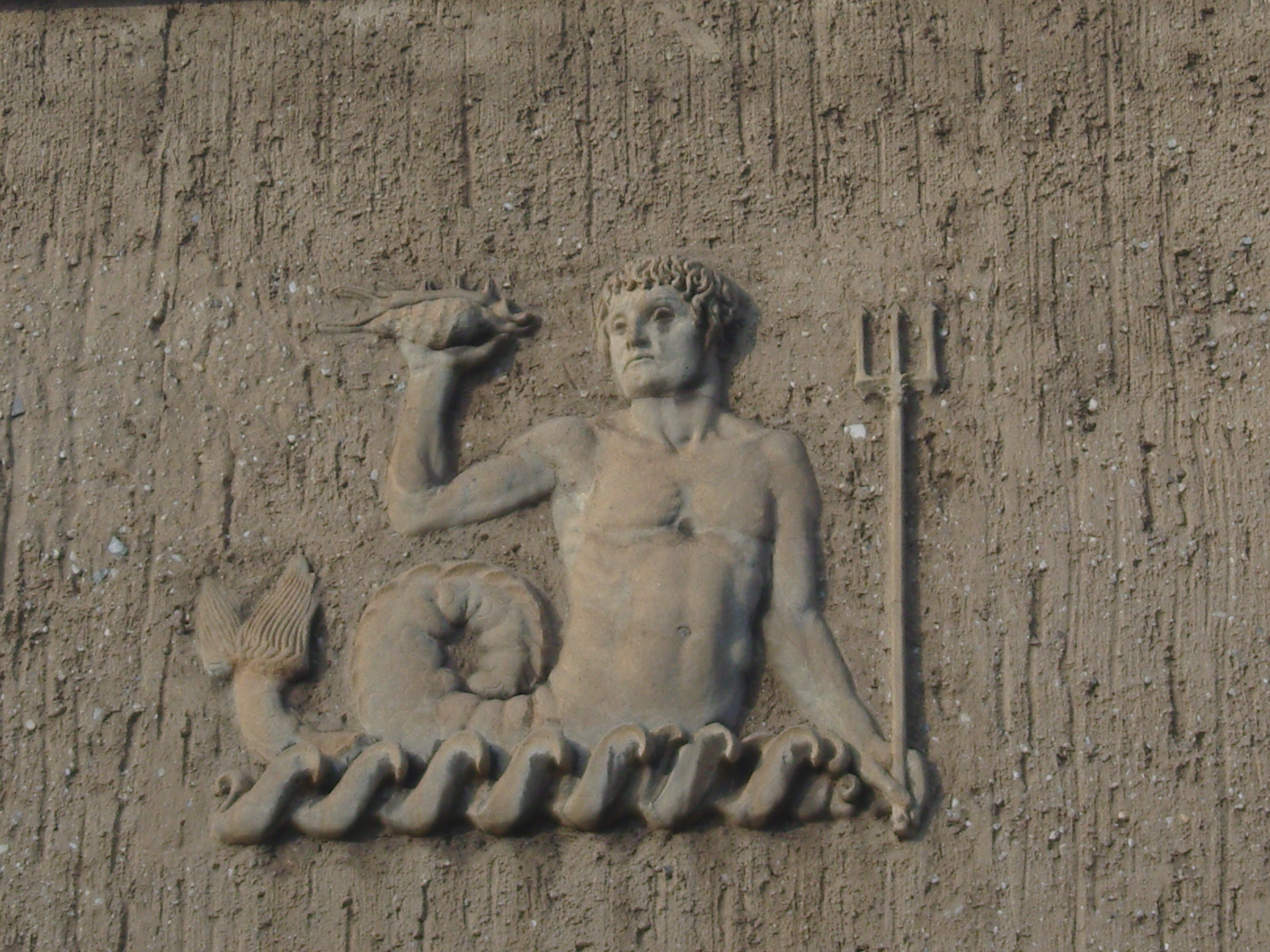 Relief eines Wassermanns am Sachsenbad in Dresden